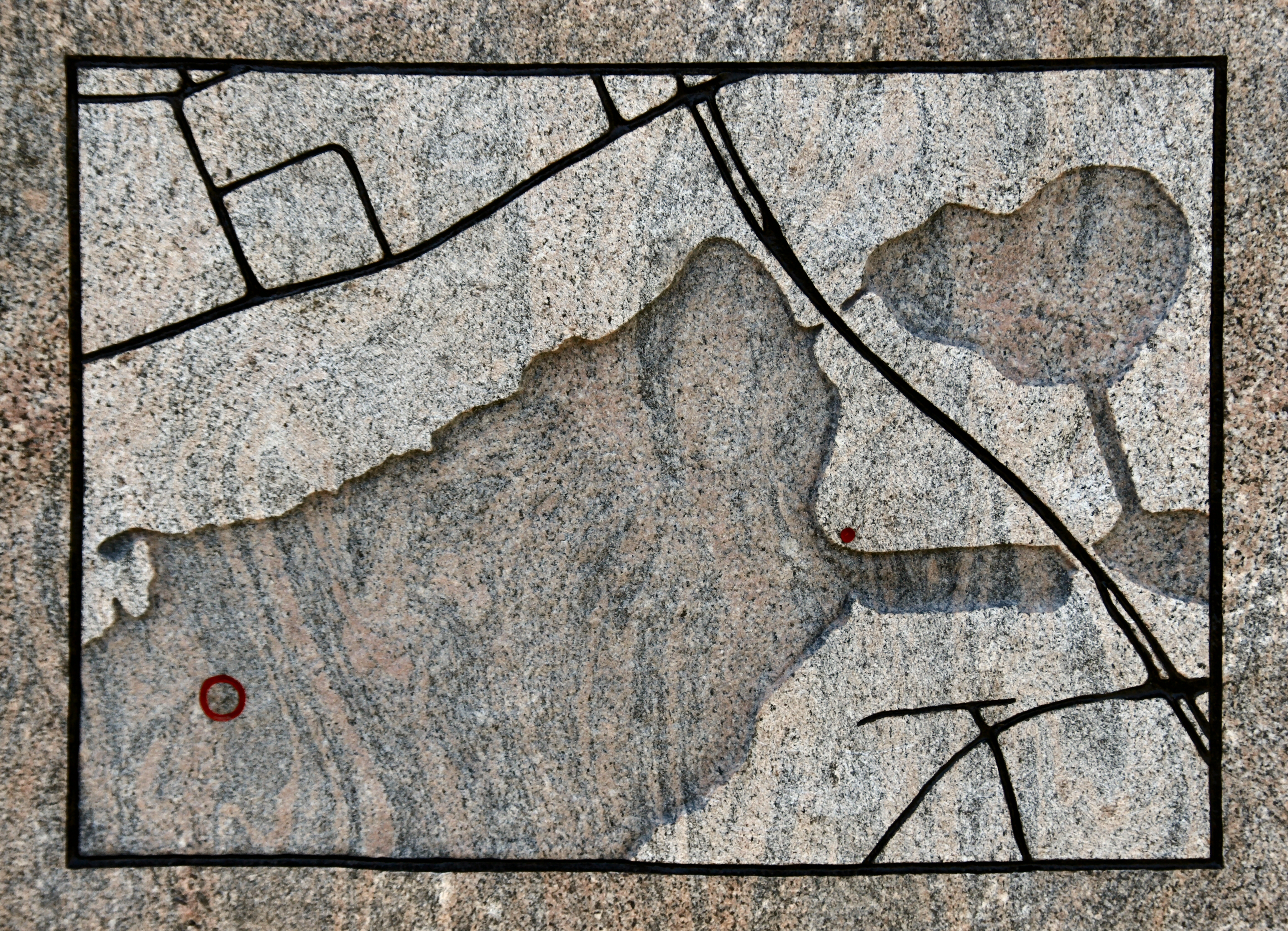 Kort, på mindesten for ofrene ved Damkatastrofen 1959, der viser hvor mindestenen står og hvor ulykken skete.